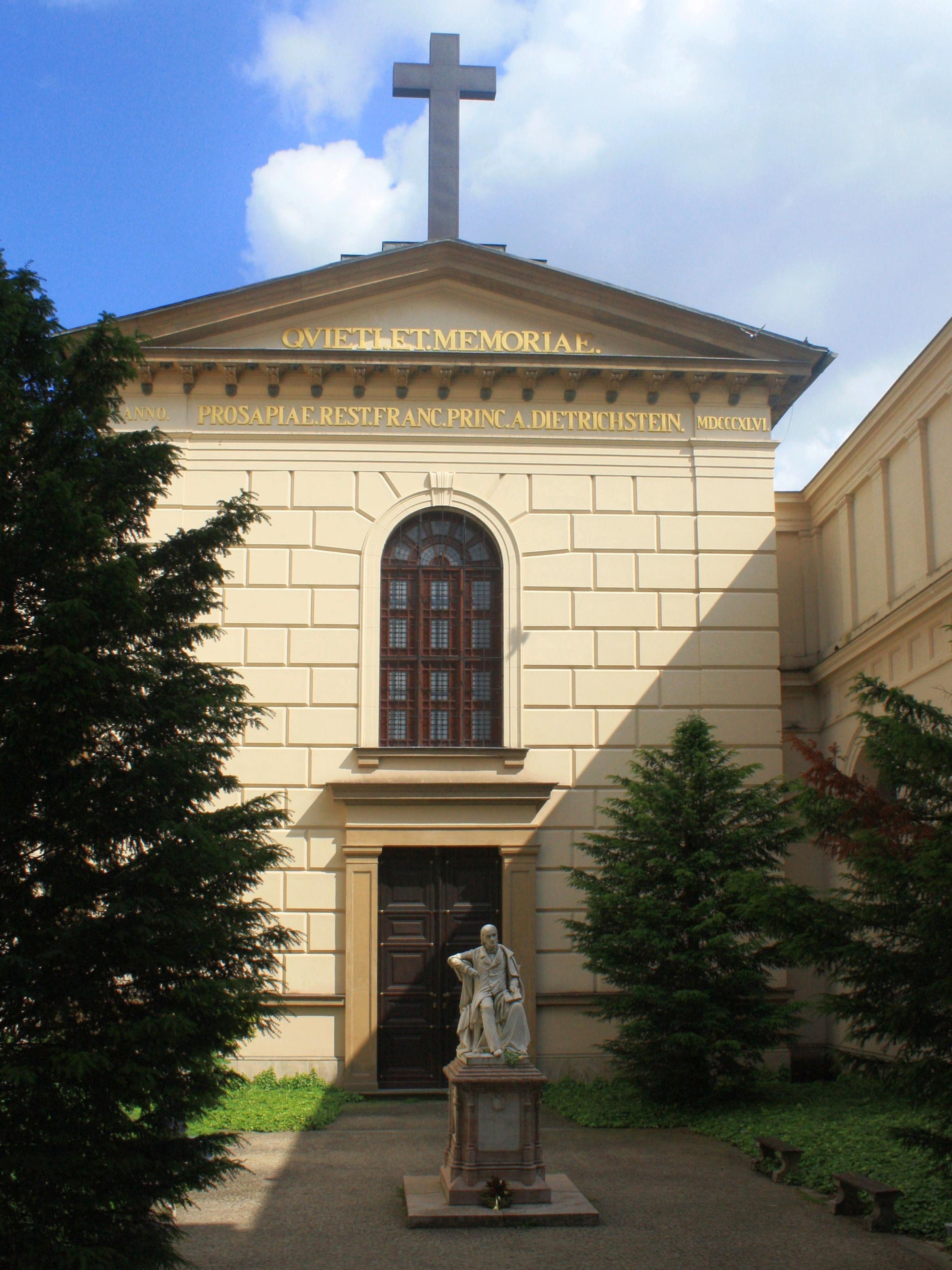 Dietrichstein-Grabmal in Mikulow